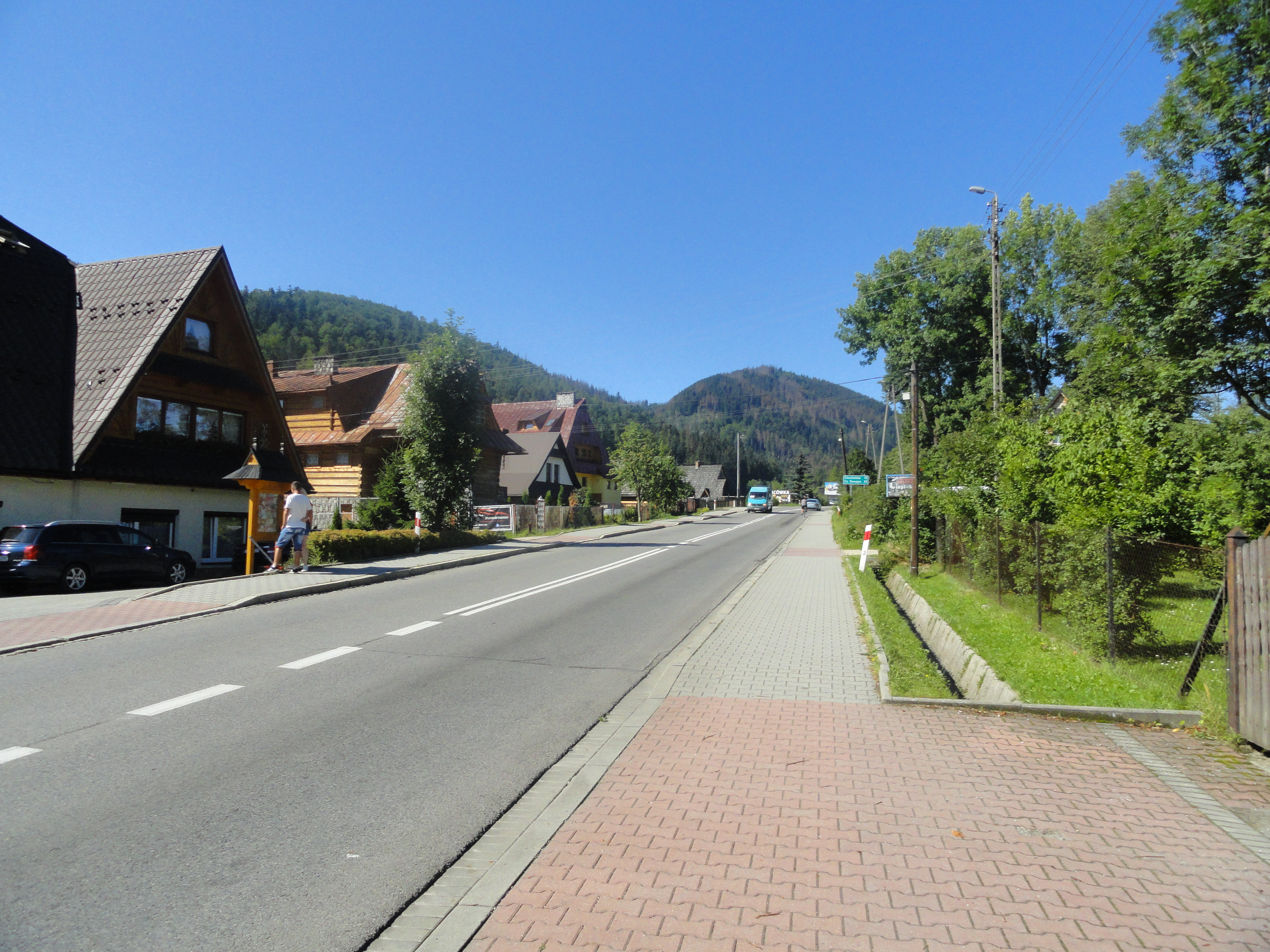 Ulica Krzeptówki w Zakopanem.